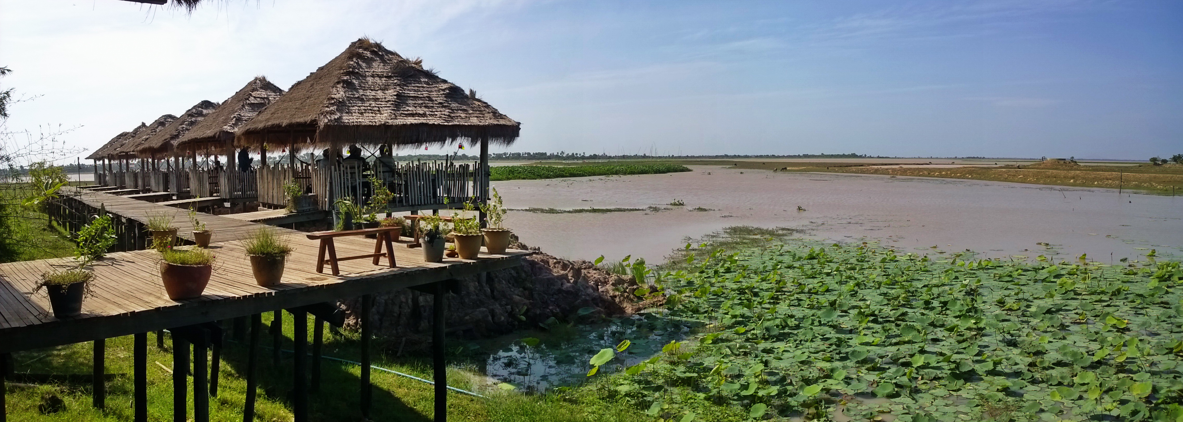 Prey Pras, ឃុំ ត្បែង, Cambodia